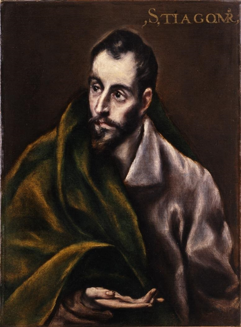 La obra representa a Santiago el Mayor, uno de los doce Apóstoles.